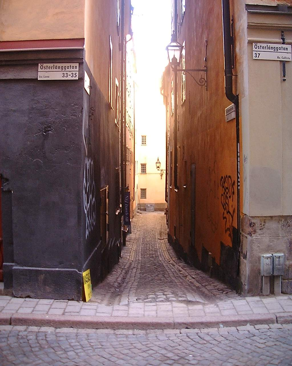 20, Lilla Hoparegränd from Österlånggatan, Gamla stan, Stockholm.